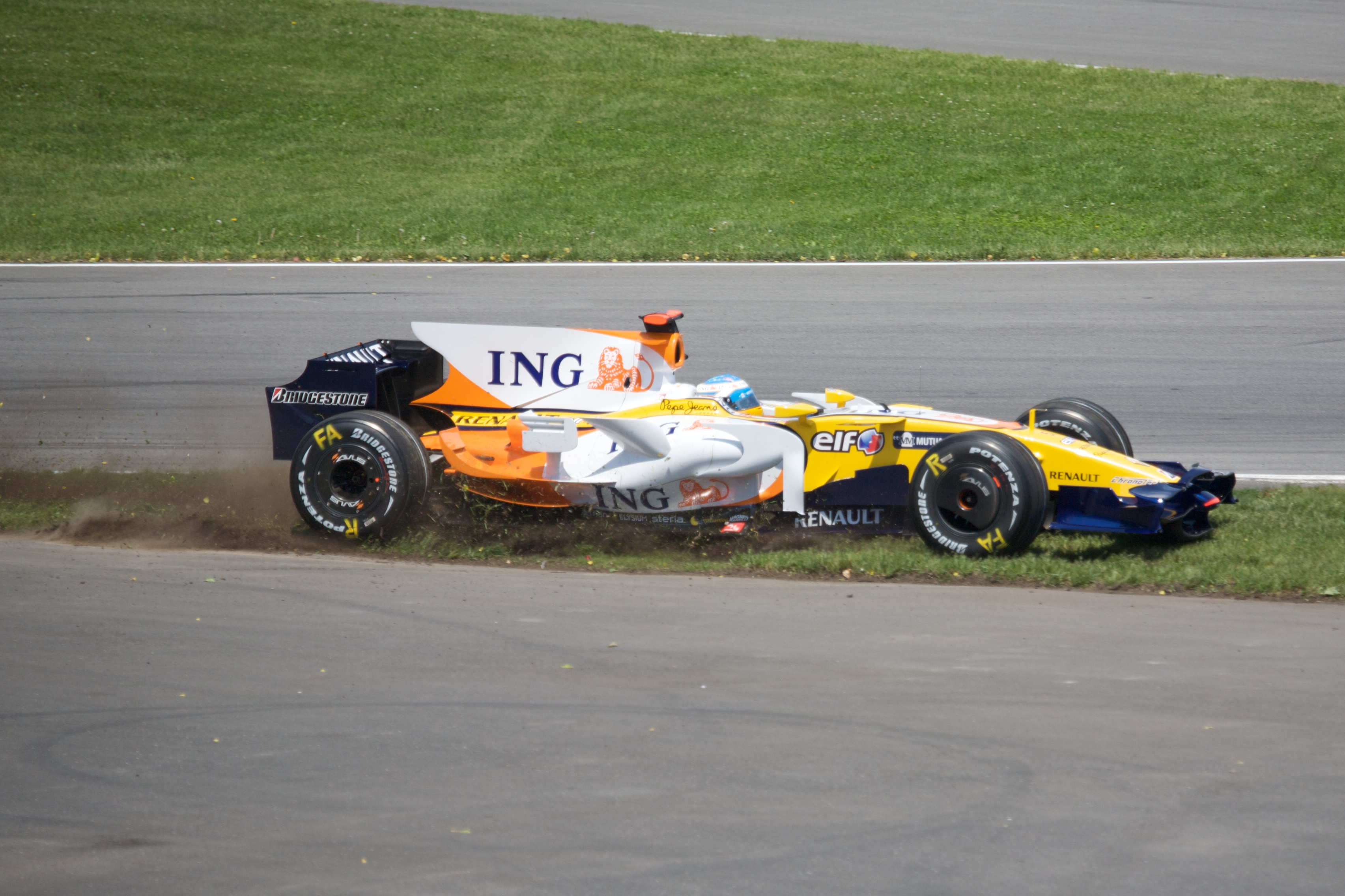 Alonso at Canada 2008